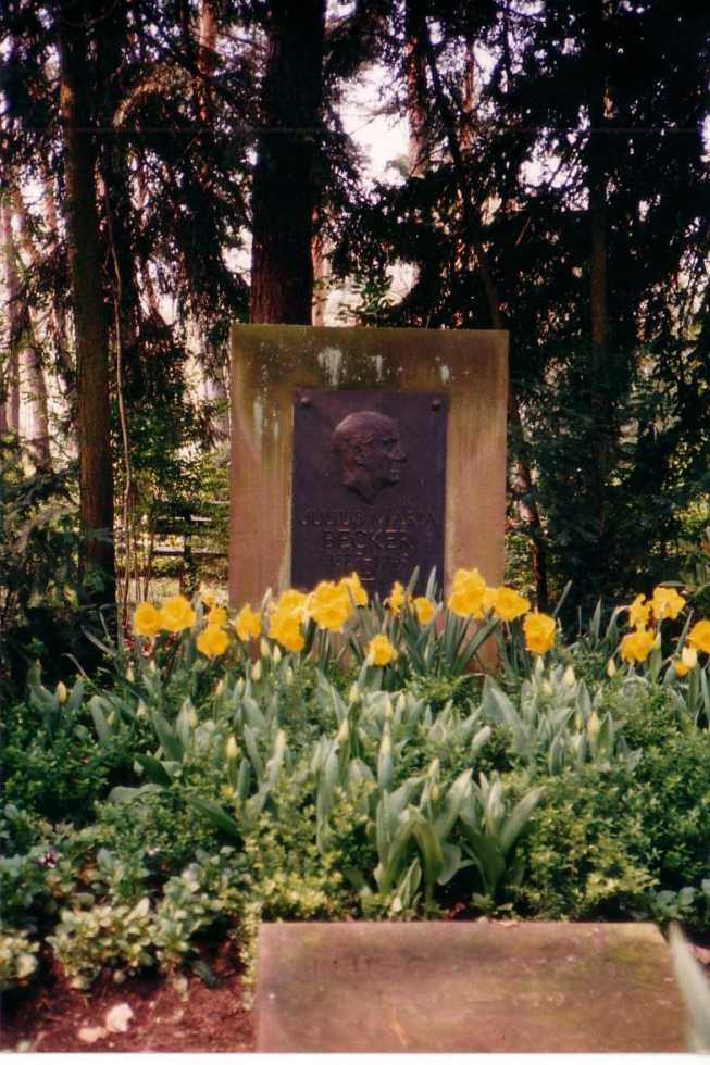 Julius Maria Becker (* 29. März 1887 in Aschaffenburg; † 26. Juli 1949 ebenda) war ein deutscher Autor, Dramatiker und Lyriker.